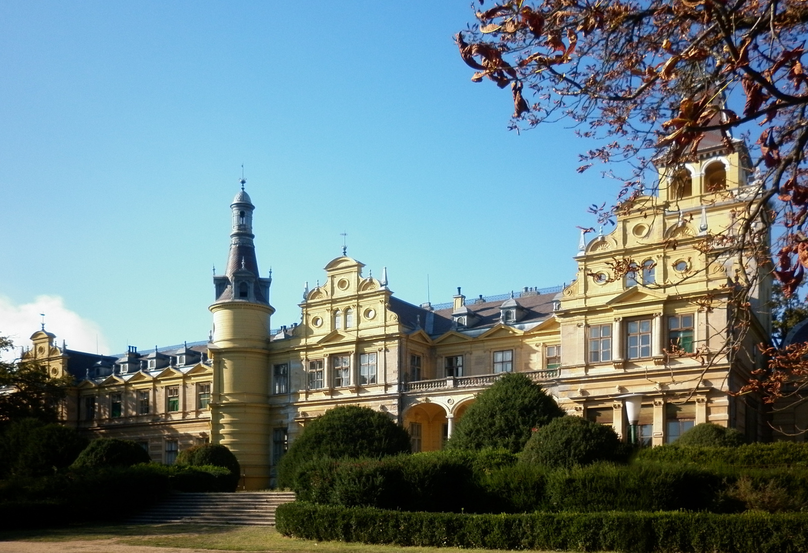 Wenckheim-kastély (Szabadkígyós, Tangazdaság 22-23.) This is a photo of a monument in Hungary, Identifier: 2579